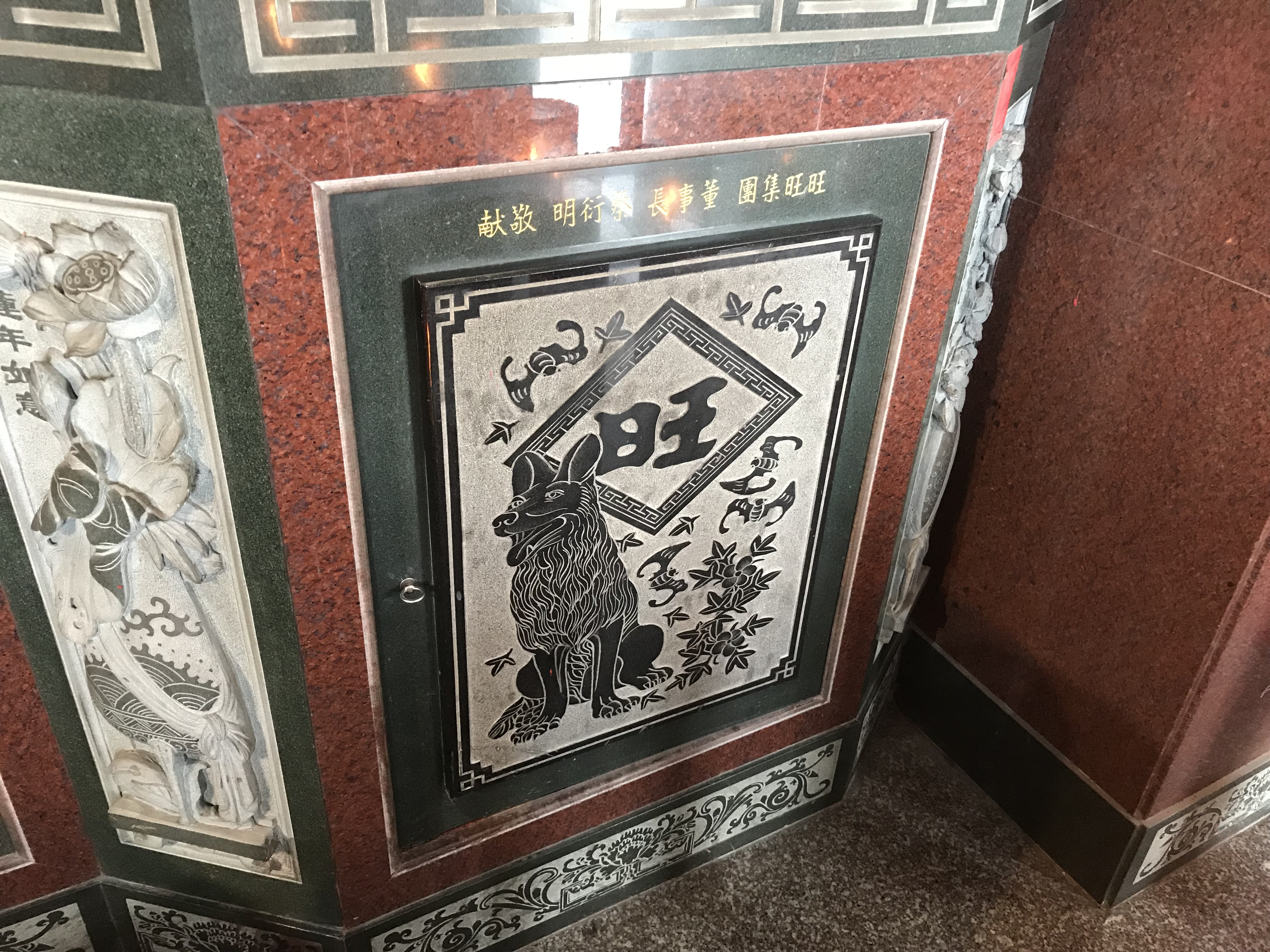 乾華十八王公祠旺旺集團蔡衍明敬獻的石刻